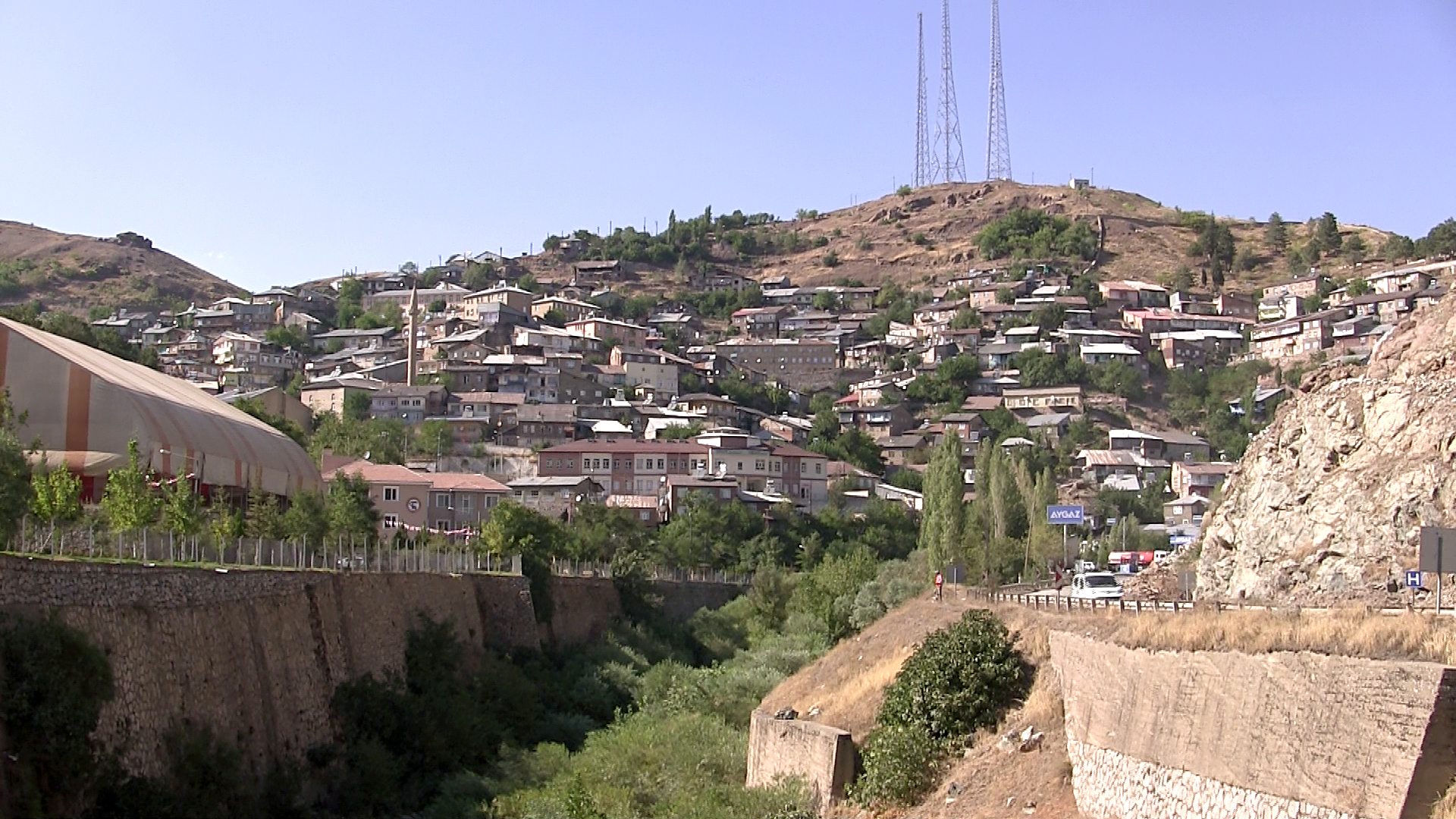 Maden, türkische Stadt in der Provinz Elazığ, am Maden Çayı, einem Quellfluss des Tigris